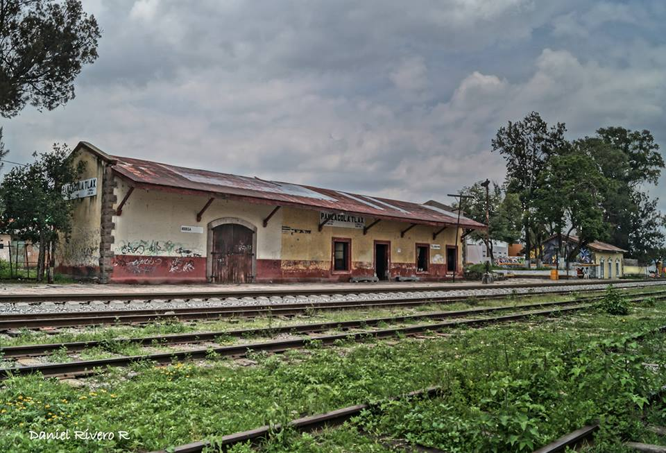 Estación de tren de Panzacola